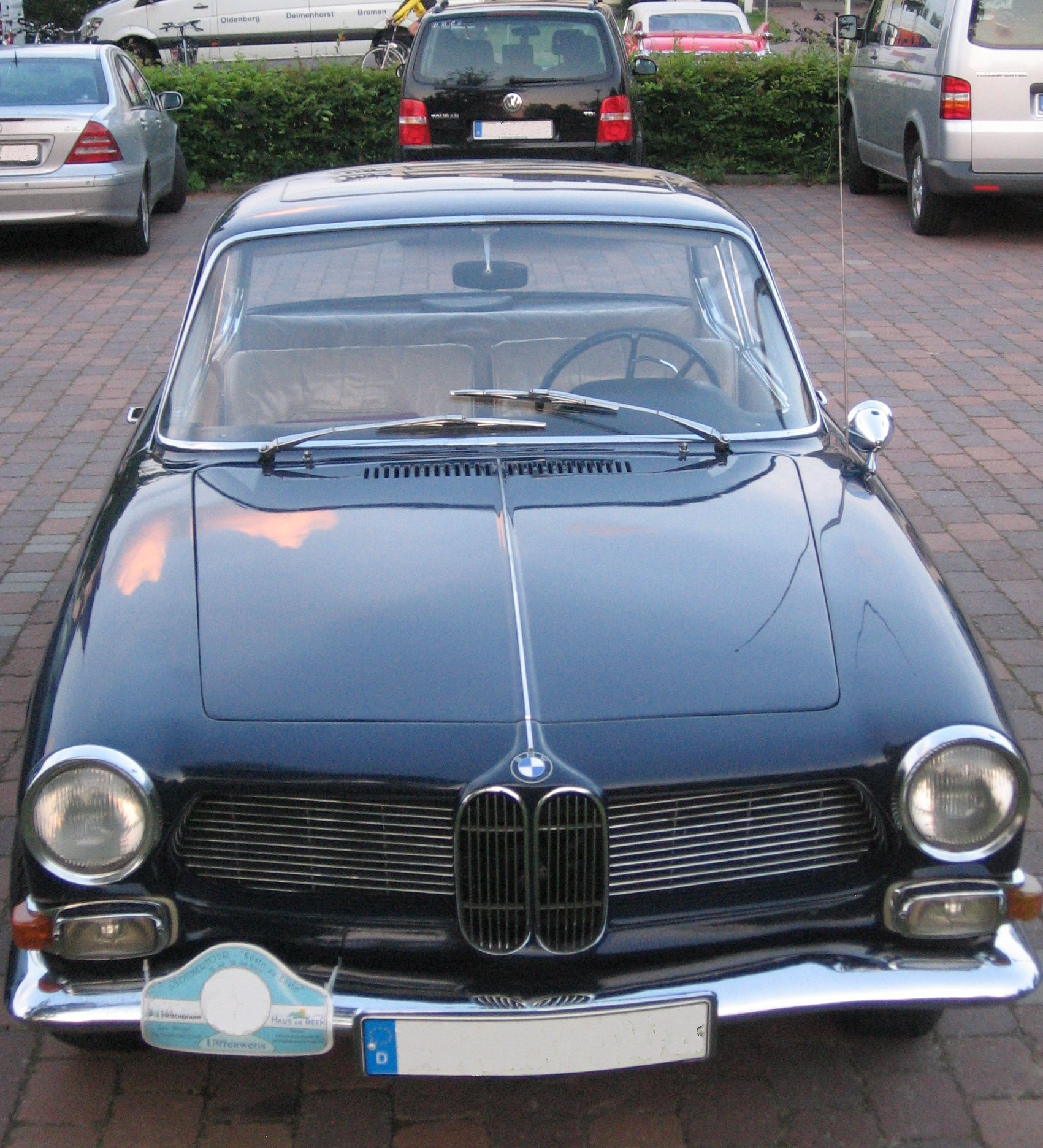 BMW 3200 CS